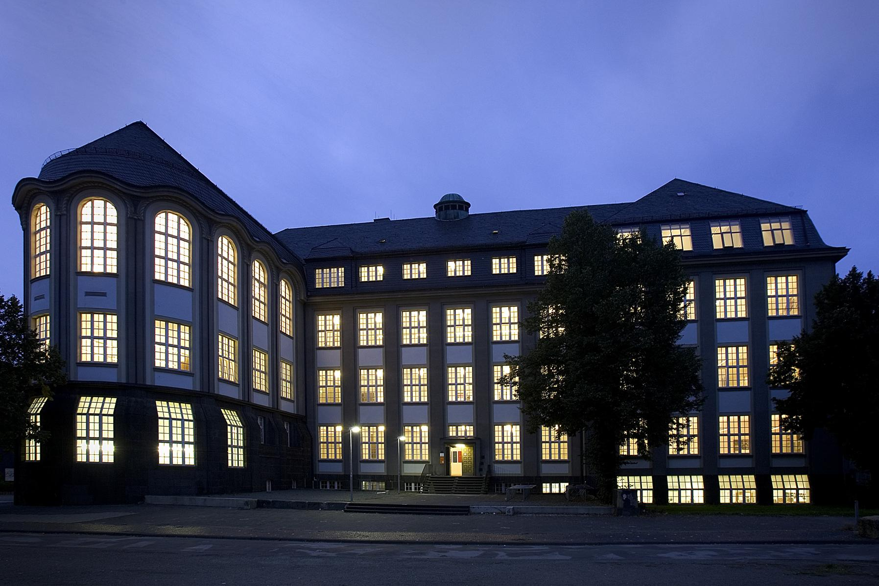 Hochschule Trier - Standort Paulusplatz